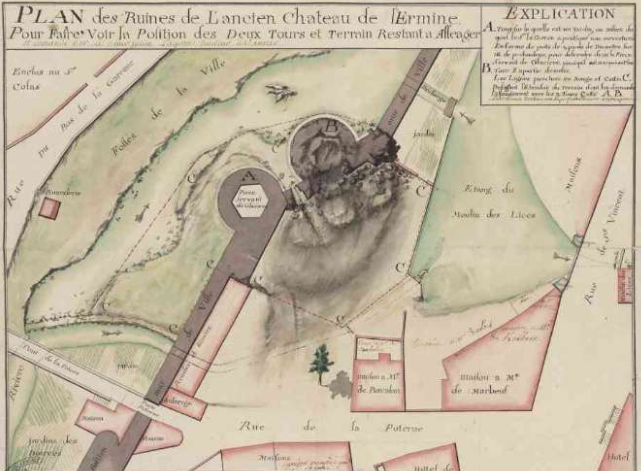 Référence C 5201 (3) Titre (article, revue ou monographie) Plan des ruines de l'ancien château de l'Ermine. Pour faire voir la position des deux tours et terrain restant à afféager. Et demandé par le Sieur Julien Lagorce traiteur à Vannes. Intitulé Légv. Plume, encre de Chine, encre brune, encre rouge, lavis et aquarelle, 1769 env. Date 18e siècle, fin Descripteurs documents figurés URBANISME/ AFFEAGEMENT/ FORTIFICATION/ TOUR FORTIFIEE/ CHATEAU/ AUBERGE/ PONT/ ETANG/ MOULIN A EAU/ HOTEL PARTICULIER/ PLACE PUBLIQUE/ RIVIERE Descripteurs géographiques VANNES / MORBIHAN Lieu-dit Lices (place) / Ermine (L') (château) / Rosmadec (hôtel) Type de document PLAN MANUSCRIT Format 037,6 x 47,8 Couleur couleur Echelle 1/294